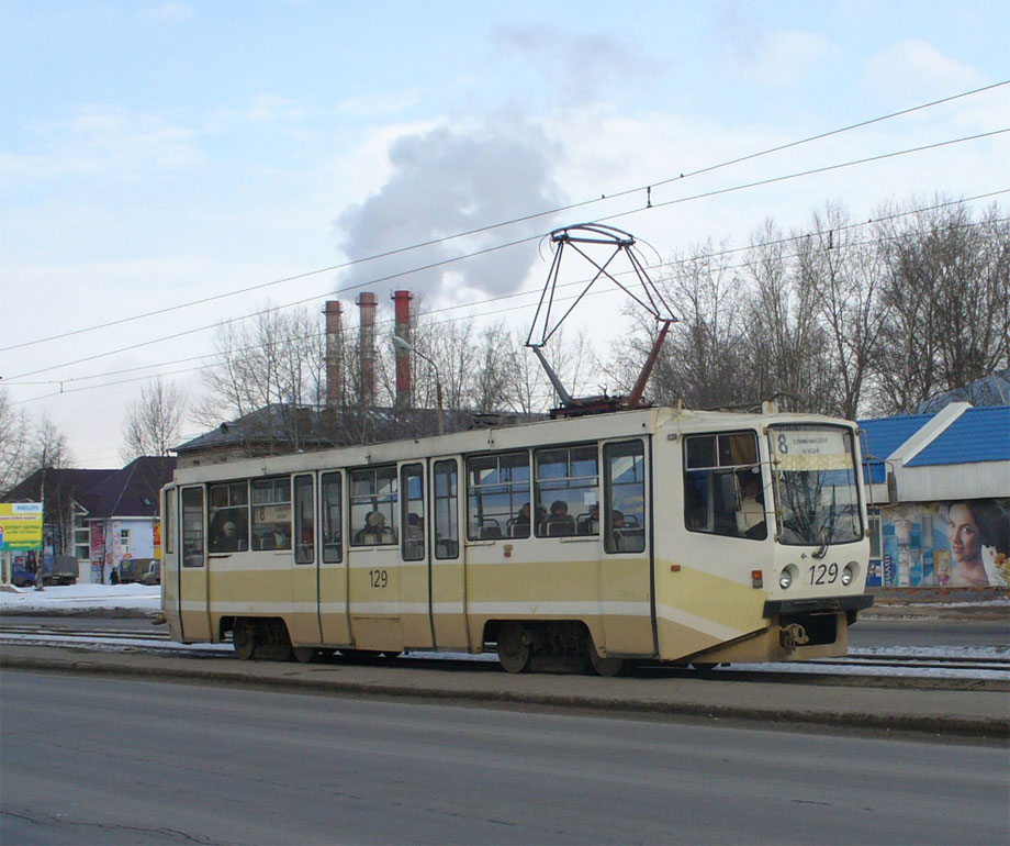 Трамвай 71-608КМ №129 на Проспекте Победы в Череповце.